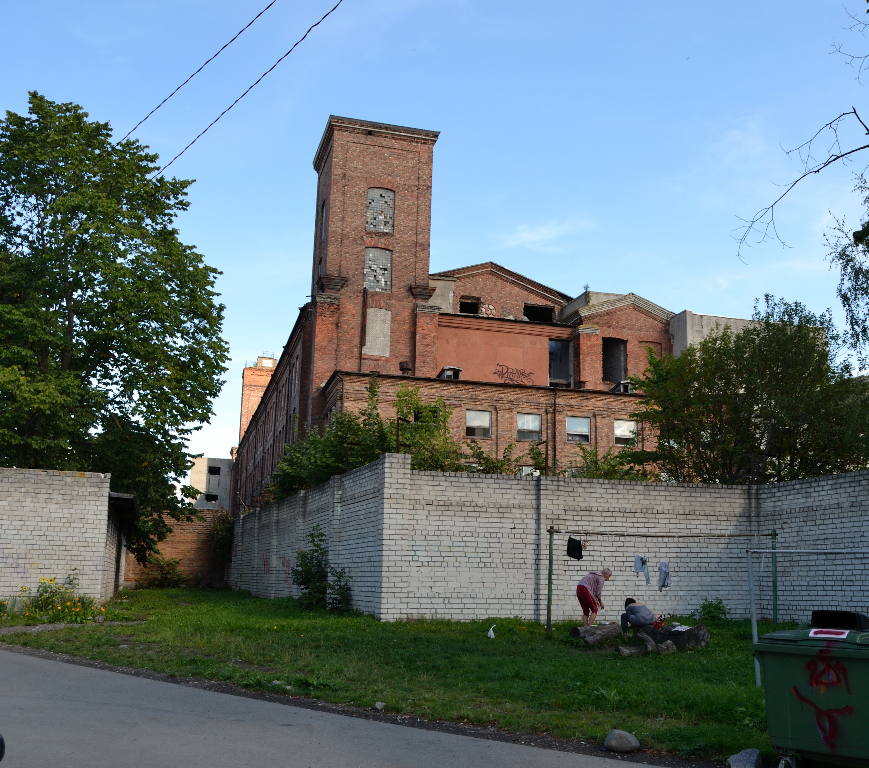 Tallinn, Balti Puuvillavabriku tootmishoone peakorpus, 1900-1909; arhitekt Rudolf Otto von Knüpffer.